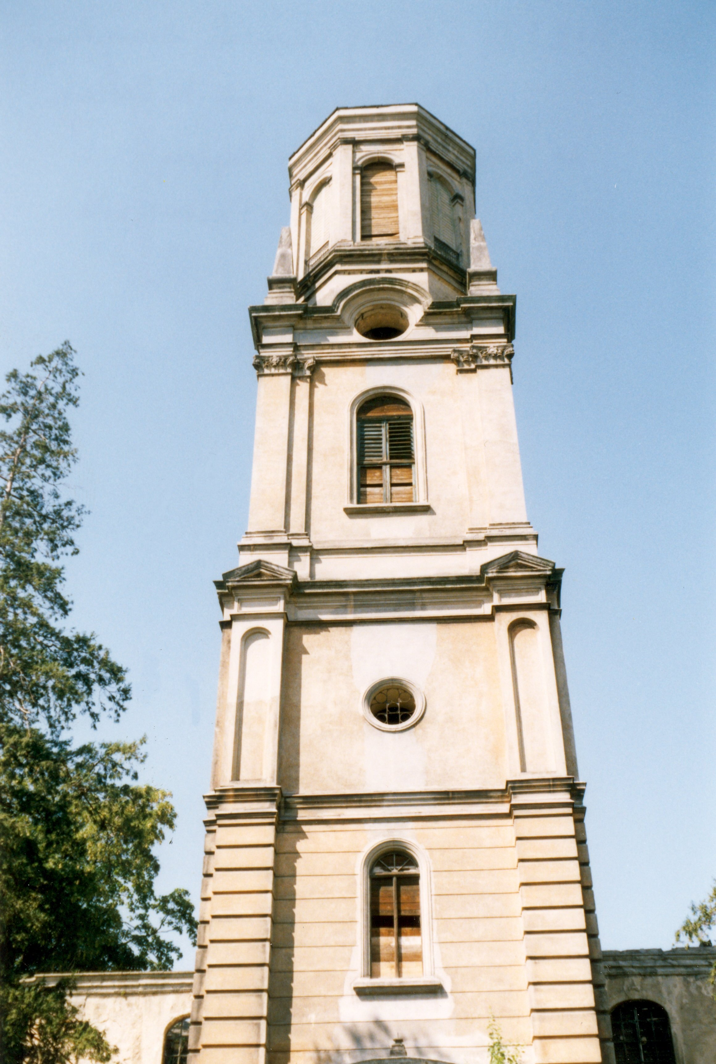 Mirsk_ewang1